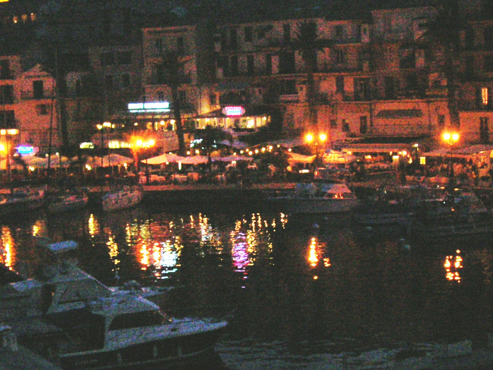 Calvi by night.